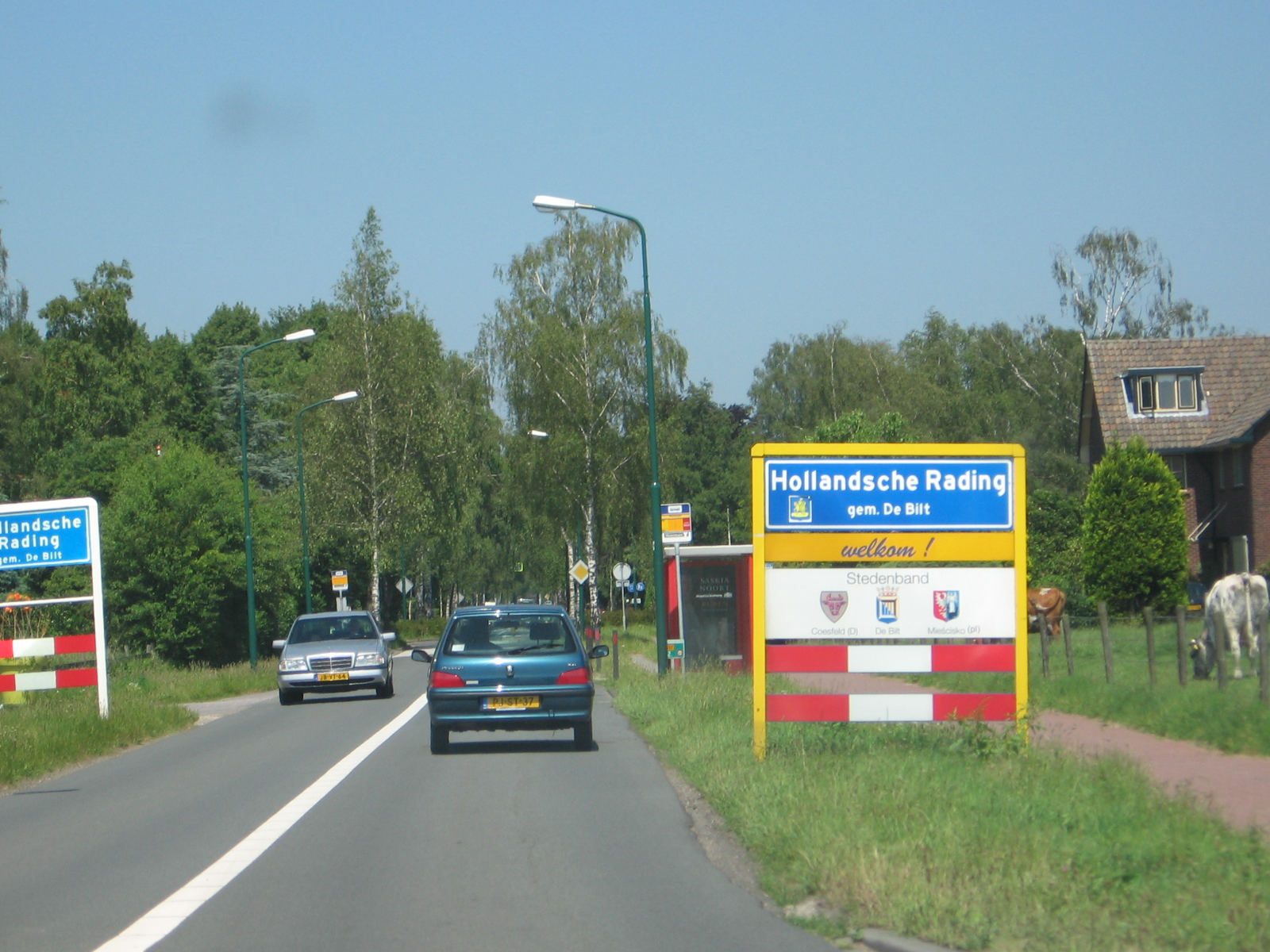 Hollandsche Rading, juni 2006